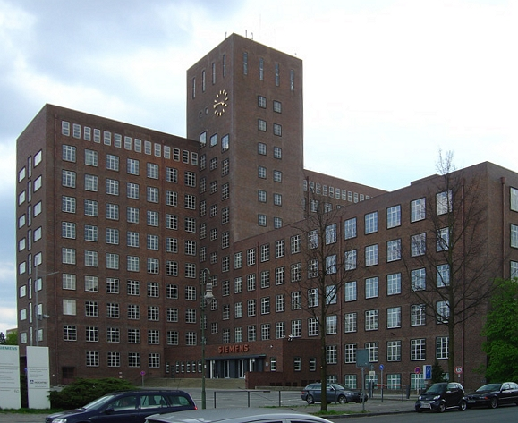 Siemens Wernerwerk, Siemensstadt, Berlin, Germany